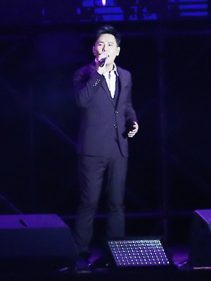 蔡老师真幽默 阿哲live真好听 燕姿惊喜唱了我也很想他 耳朵很满足的一场拼盘演唱会